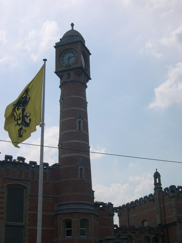 St. Peters